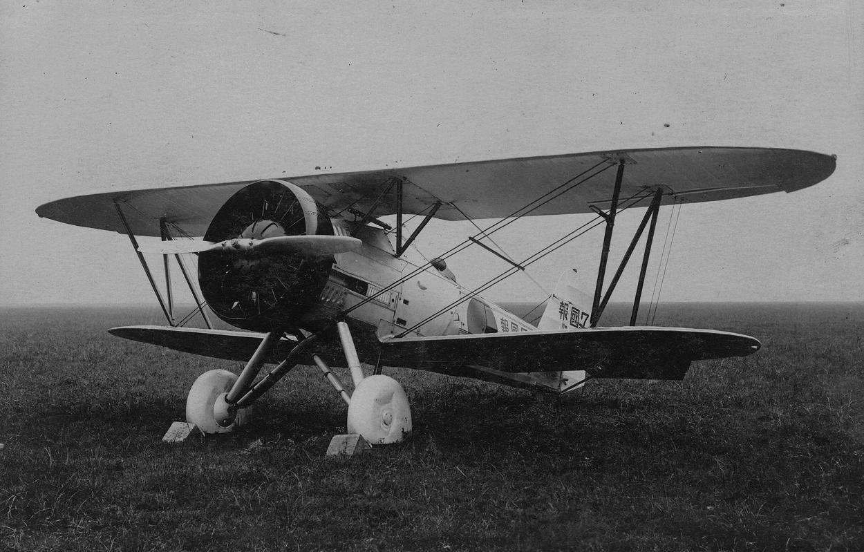 90式艦上戦闘機1型(A2N1)。